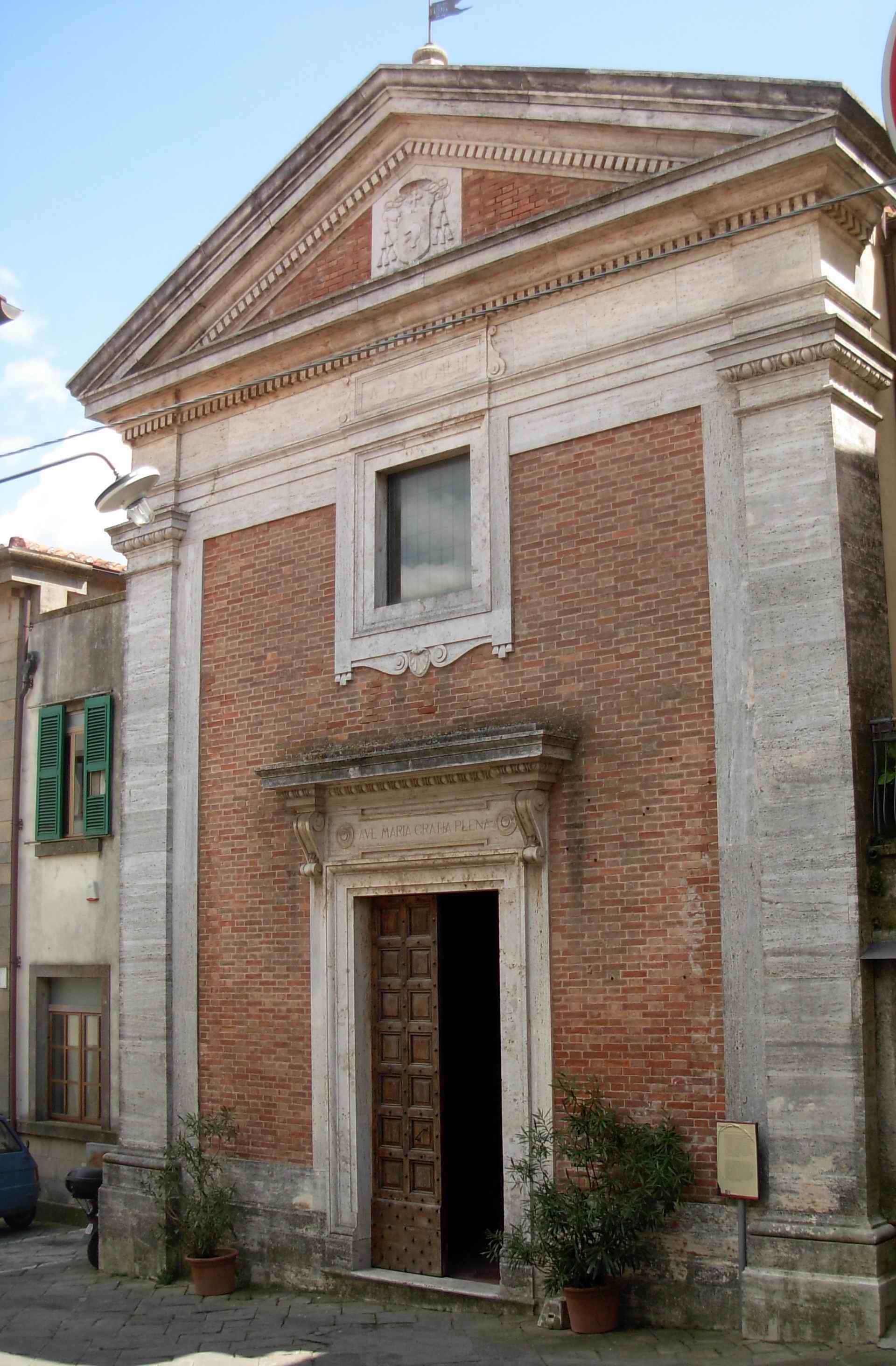 Roccastrada (Grosseto-Italia): Chiesa di San Niccolò